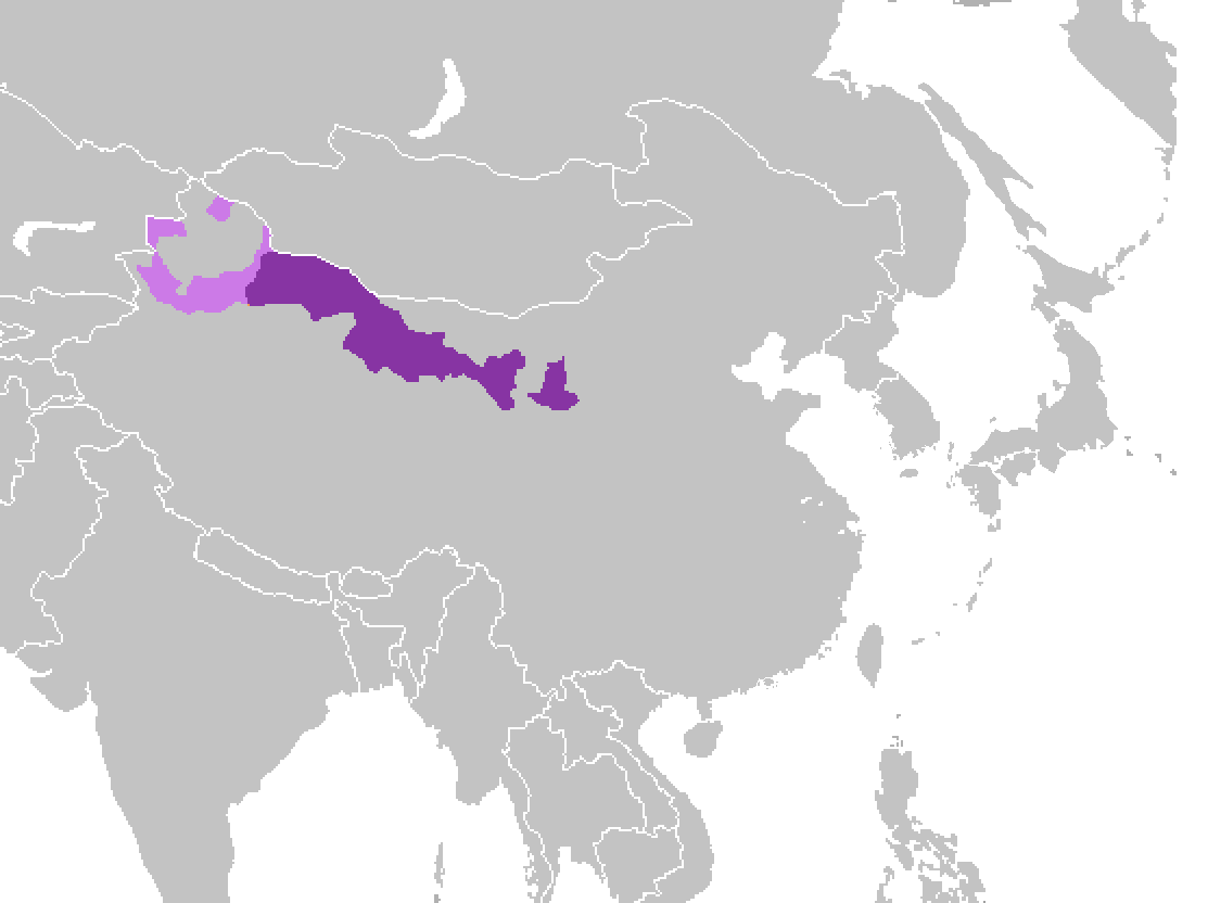 Mayoría de habantes Minorías